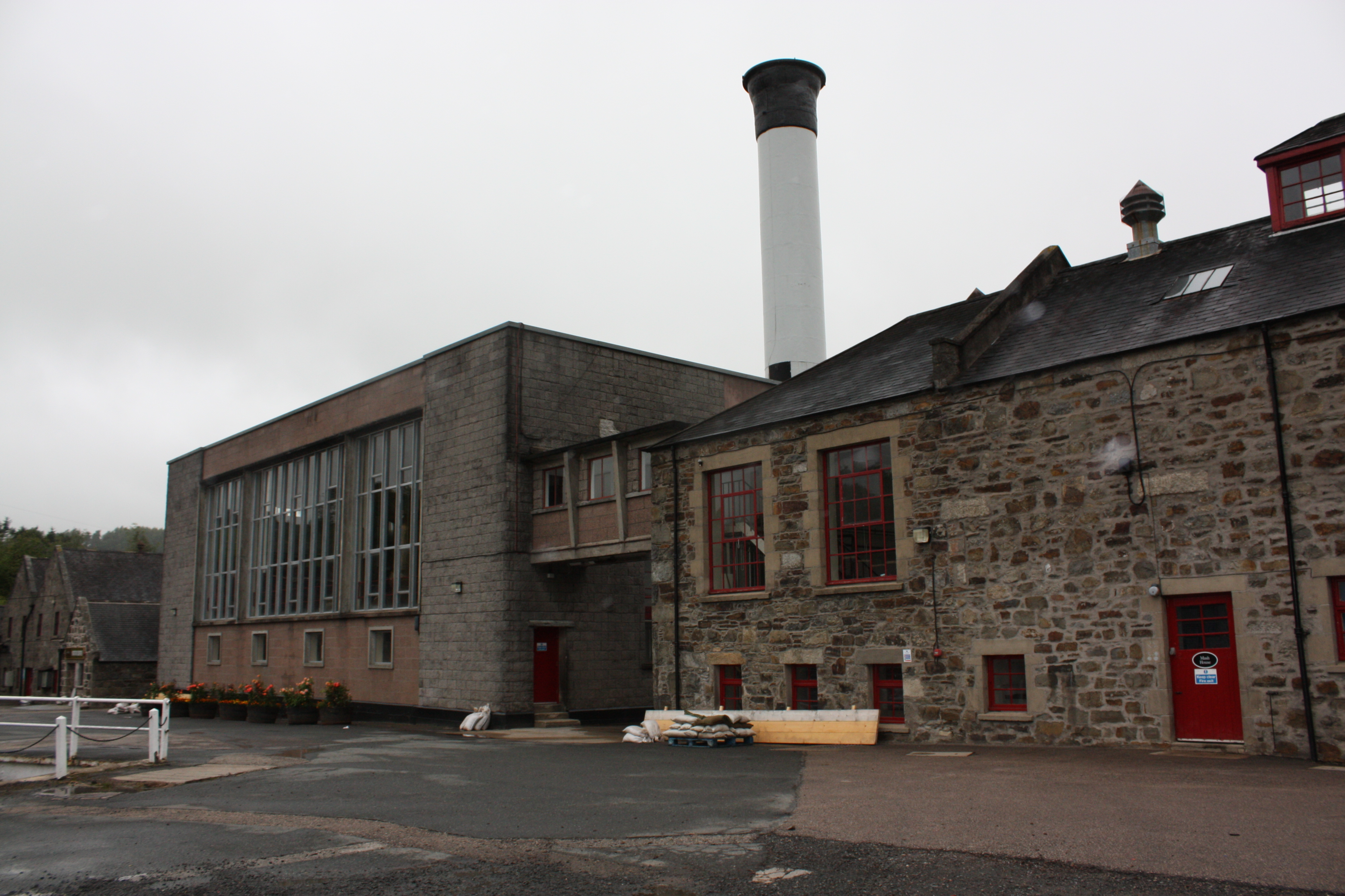 Glendronach Distillery